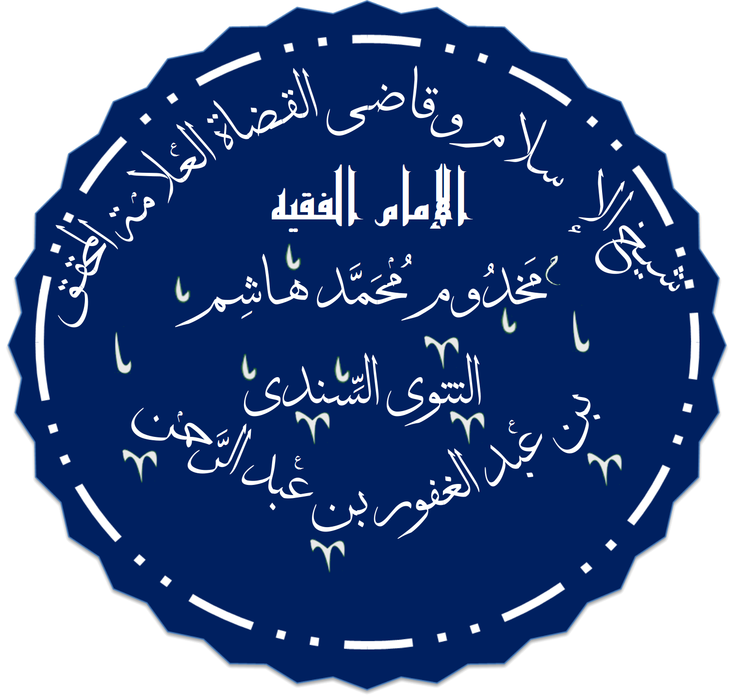 تخطيط اسم الإمام العلَّامة مخدوم محمد هاشم التتوي السندي.